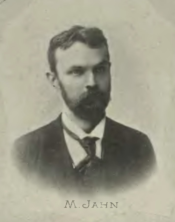 Portrét – Metoděj Jahn (1865 - 1942), Český prozaik a básník.